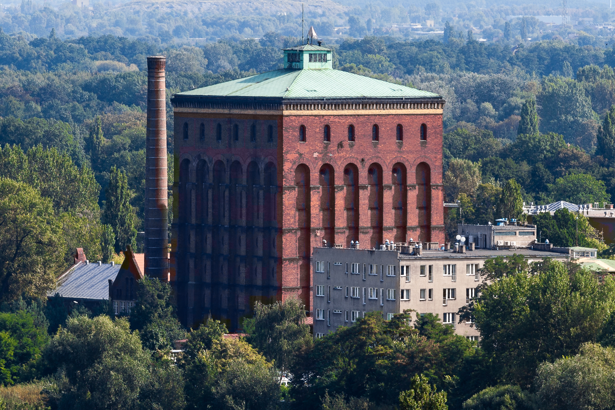 Zespół wodociągów: Wieża wodociągowa